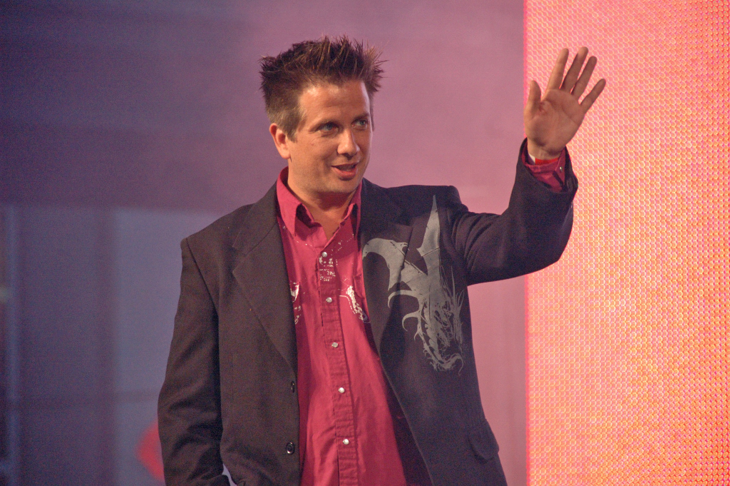 Rob Stefaniuk